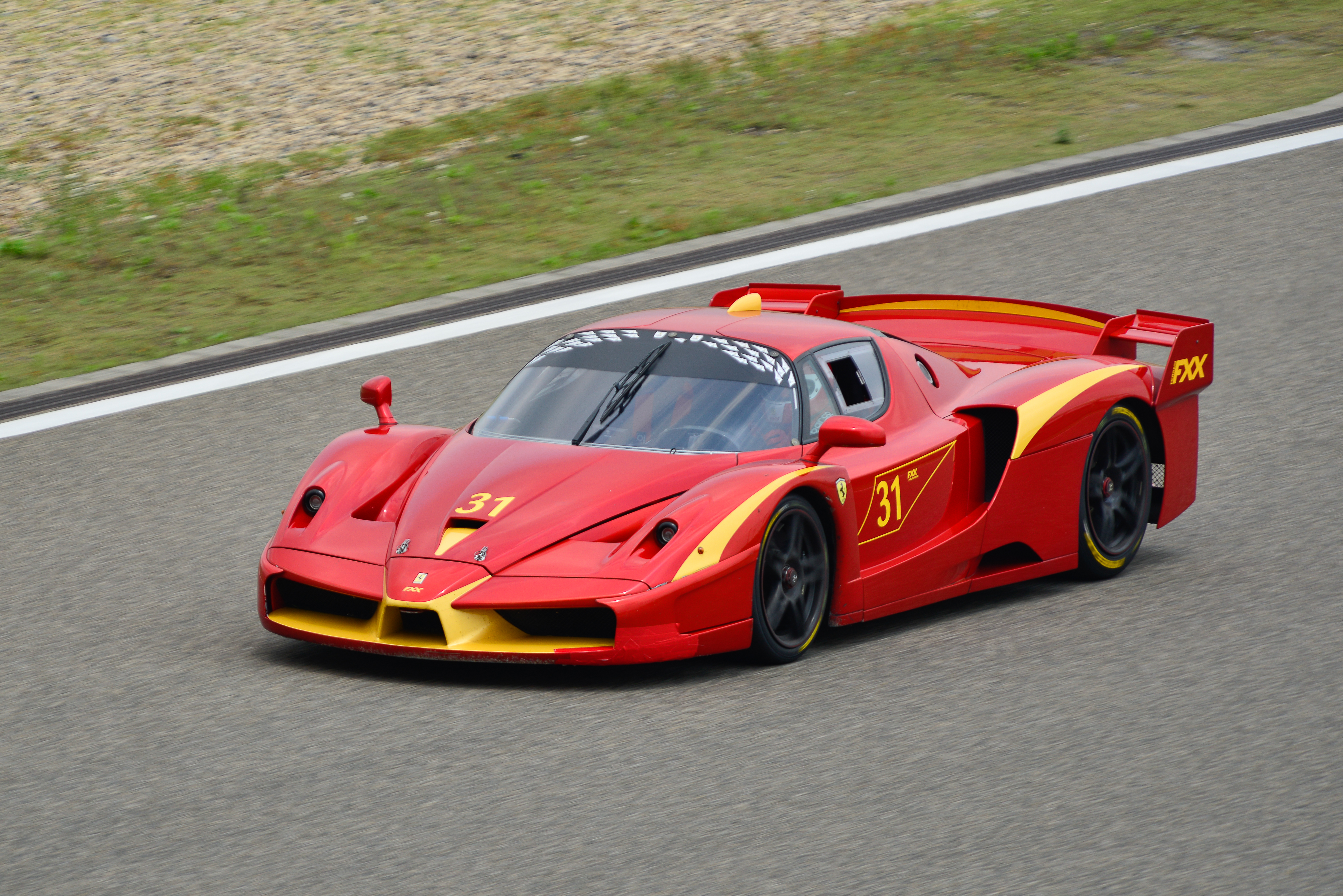 Ferrari FXX No.31